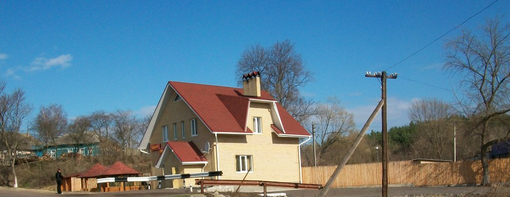 Заруцьке. Бар Обрій